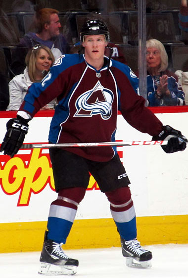 Gabriel Landeskog pregame